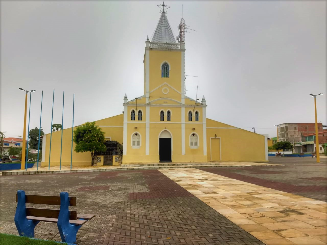 Igreja Matriz de Cocal da Estação em março de 2019.